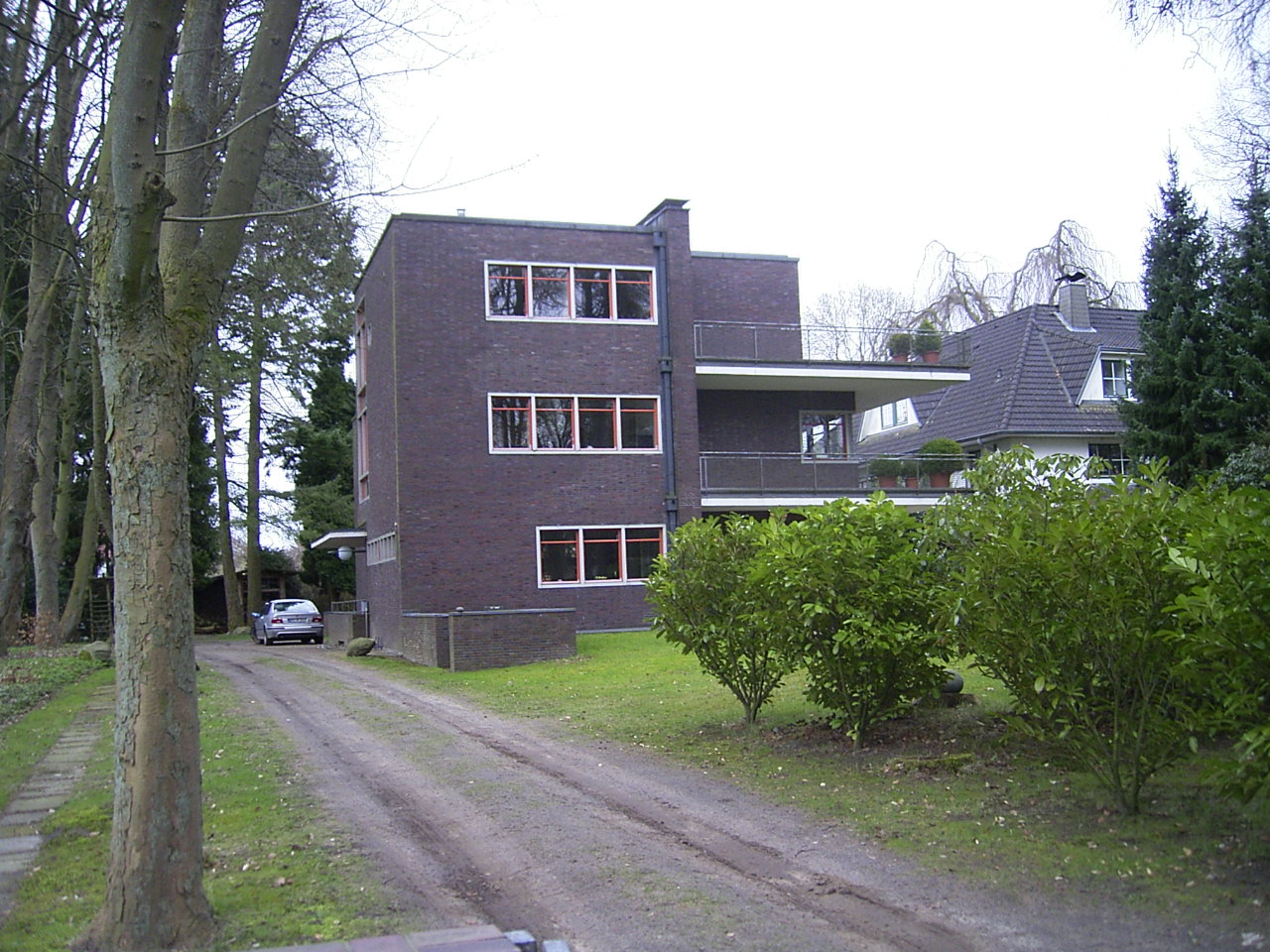 Von Karl Schneider für Eduard Müller-Drenkberg entworfenes Wohnhaus in der Bredenbekstraße 29 Wohldorf-Ohlstedt, erbaut 1928.This is a photograph of an architectural monument.